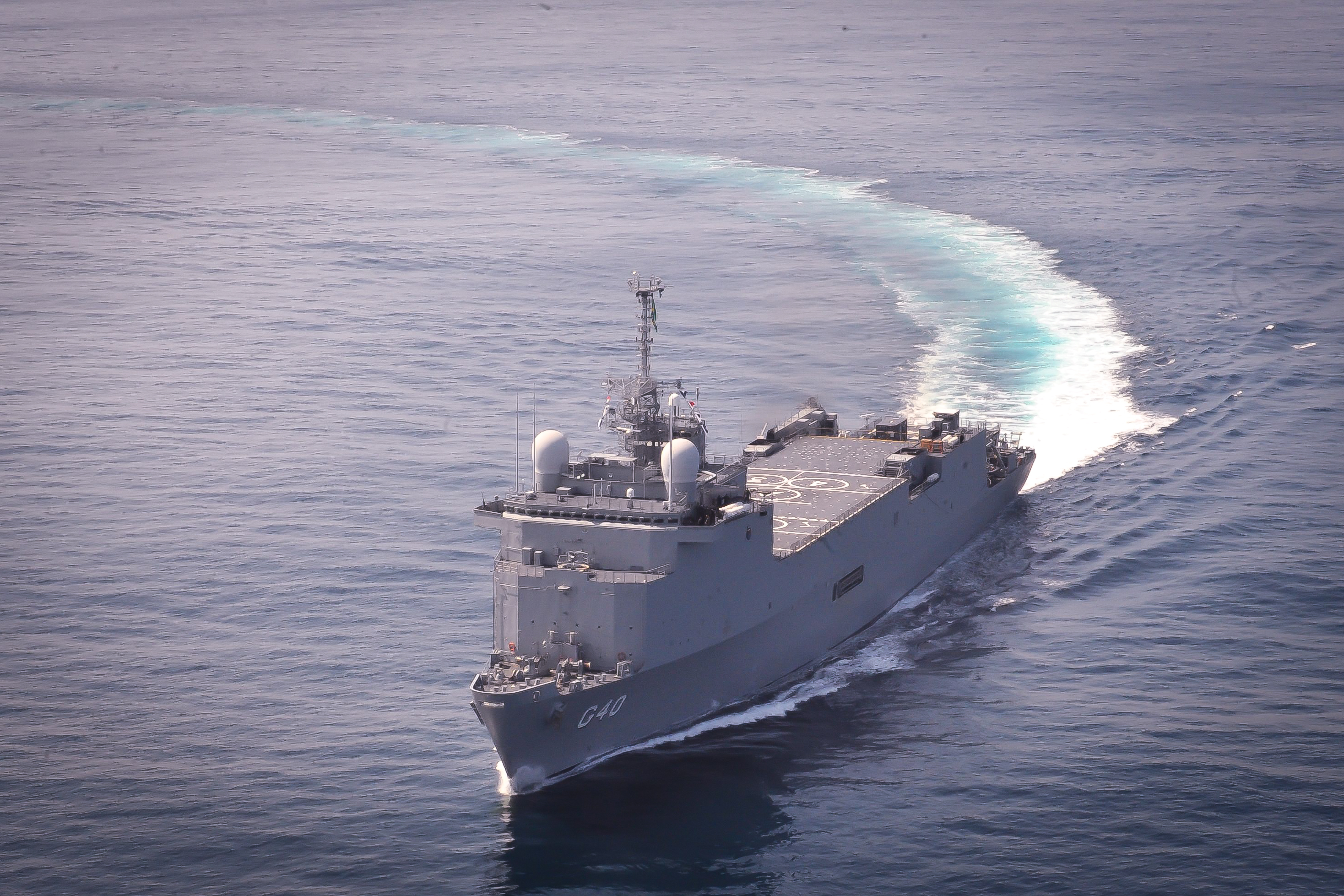 Arquivo liberado pela Marinha do Brasil através de projeto GLAM com Wiki Educação Brasil